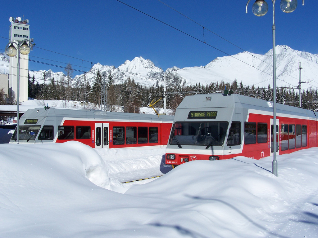 TEŽ